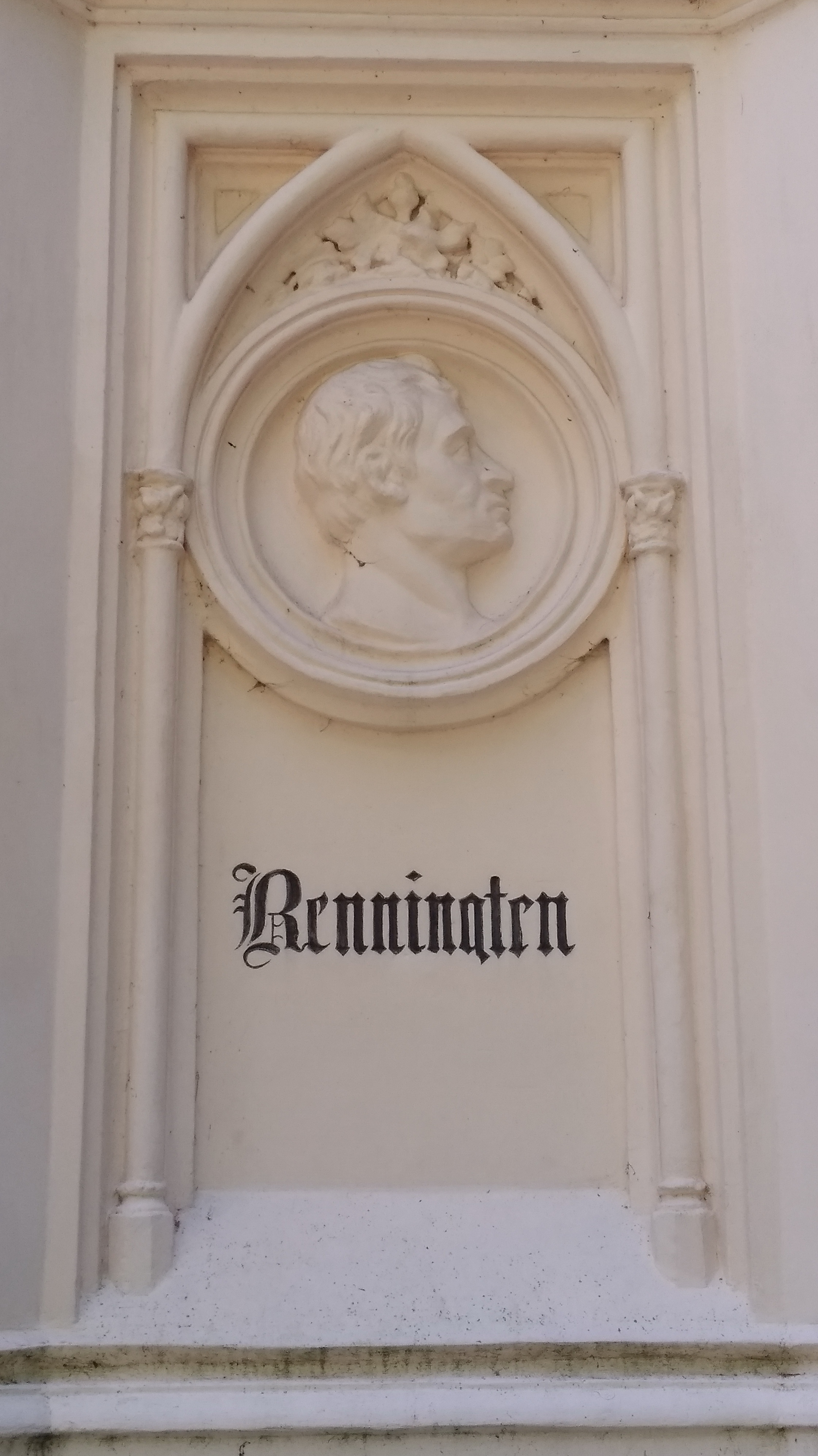 Памятник-обелиск Славы русского оружия: Багратионовск, Калининградская область